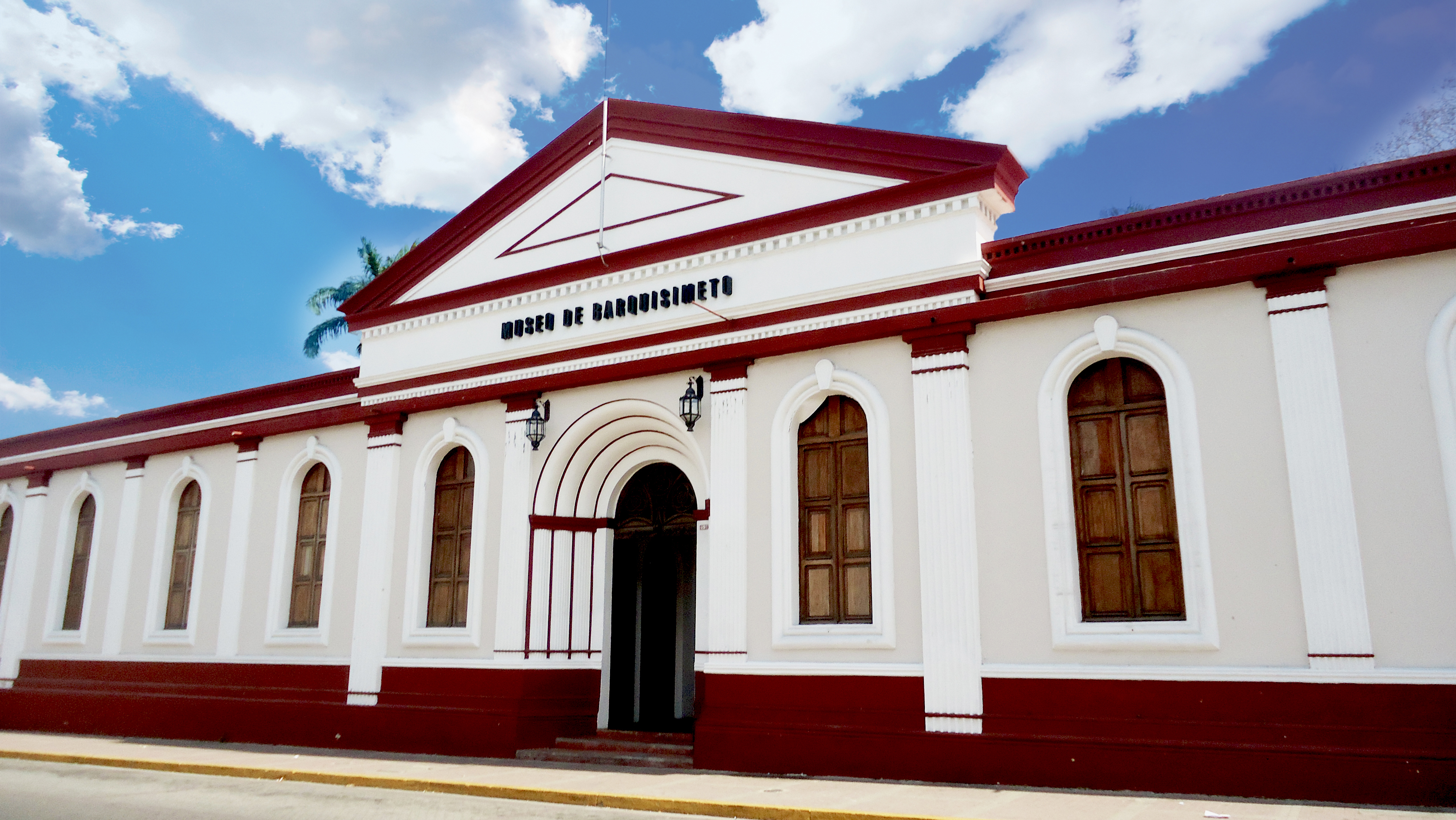 Museo De Barquisimeto. Fue la sede el antiguo Hospital de La Caridad, el cual data de 1878. En 1911 se abrieron los primeros pabellones y en mayo de 1918 se inauguraron las nuevas instalaciones, gracias a los esfuerzos del Dr. Antonio María Pineda y la idea del arquitecto alemán Justo Rosemberg. En 1939, la ciudad en homenaje a su fundador le dio su nombre a dicho hospital, el cual funcionó hasta 1954 cuando fue trasladado definitivamente a su actual sede en el extremo norte de la Avenida Vargas, dentro del marco de la celebración de los 400 años de la ciudad.